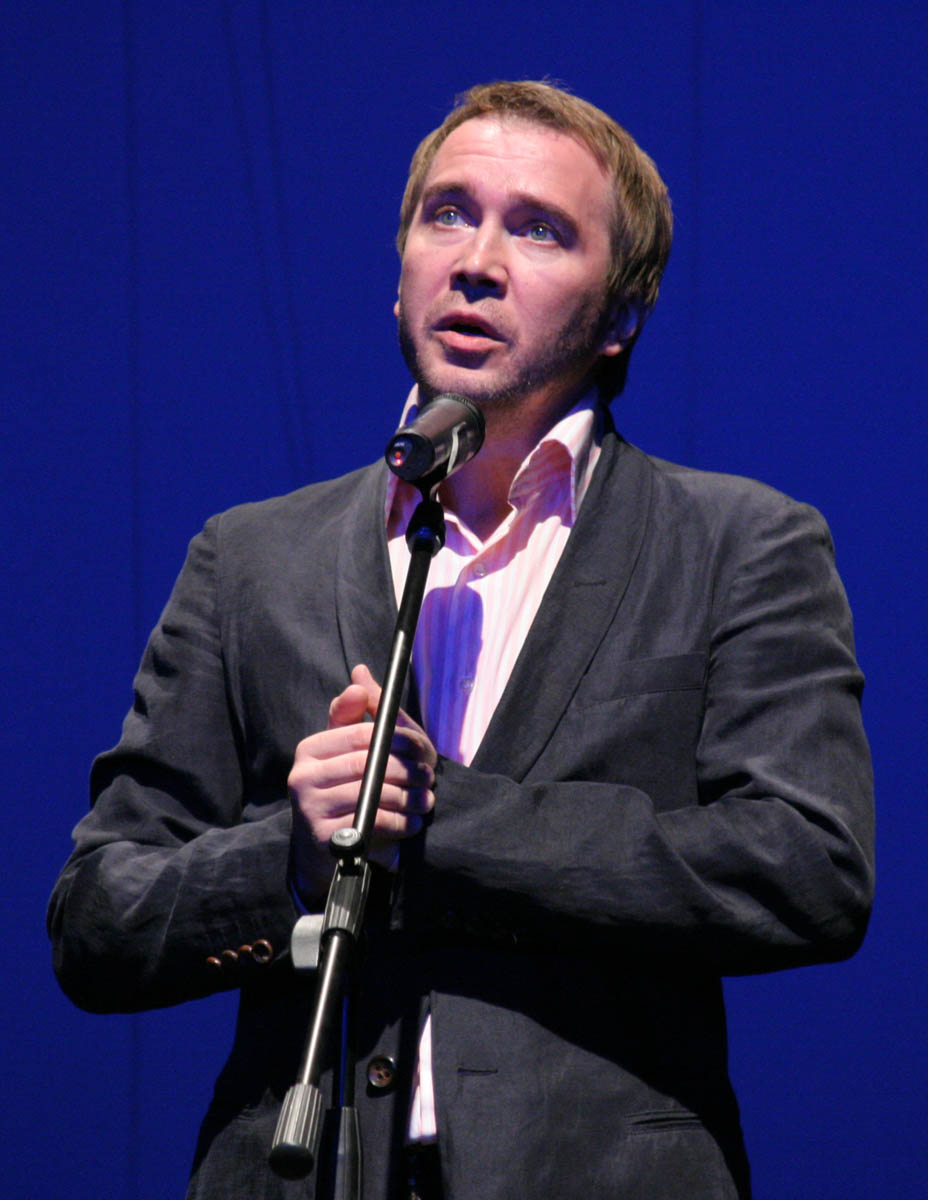 Актёр театра и кино, народный артист России Евгений Миронов. Фото с вечера памяти В.А. Ермаковой в Саратовском театре драмы.